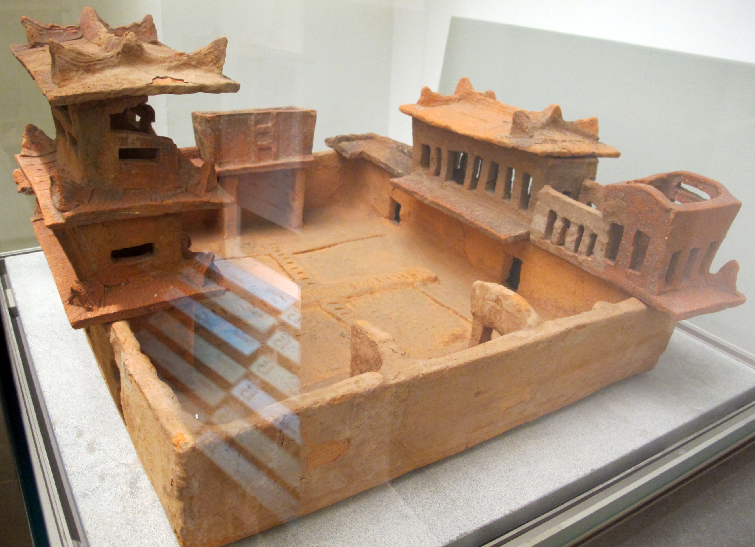 Vietnam, modello funerario di fattoria fortificata, da bim son, epoca giao chi, I-III sec.